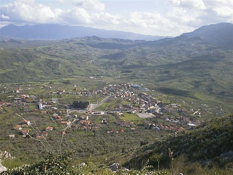 Parte del centro abitato di Foglianise, vista dal monte Caruso.